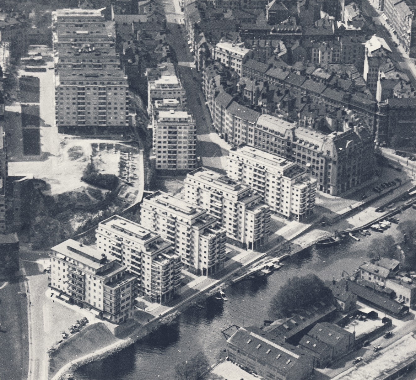 Flygfoto över området "Kungsklippn" på Kungsholmen i Stockholm